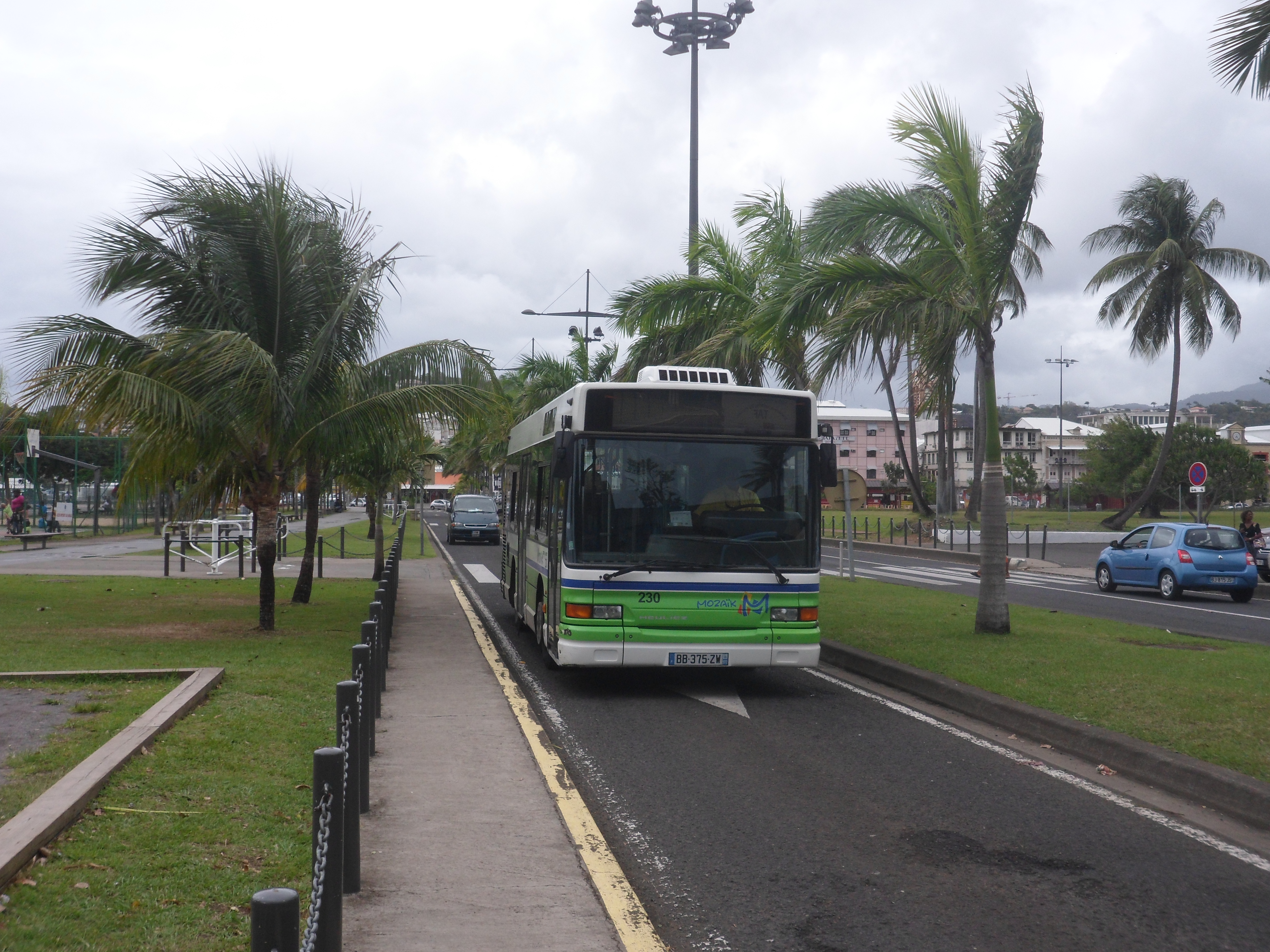 Un bus de la ligne S5, près de la gare multimodale de la Pointe Simon, à Fort-de-France en Martinique. Ce couloir bus servira au TCSP en 2015.